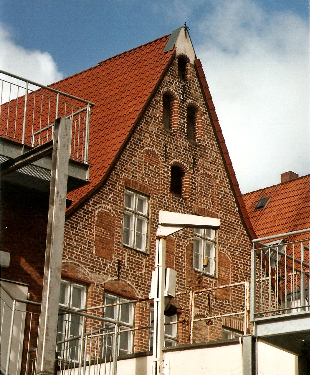 Das Robert’sches Haus, Rückansicht